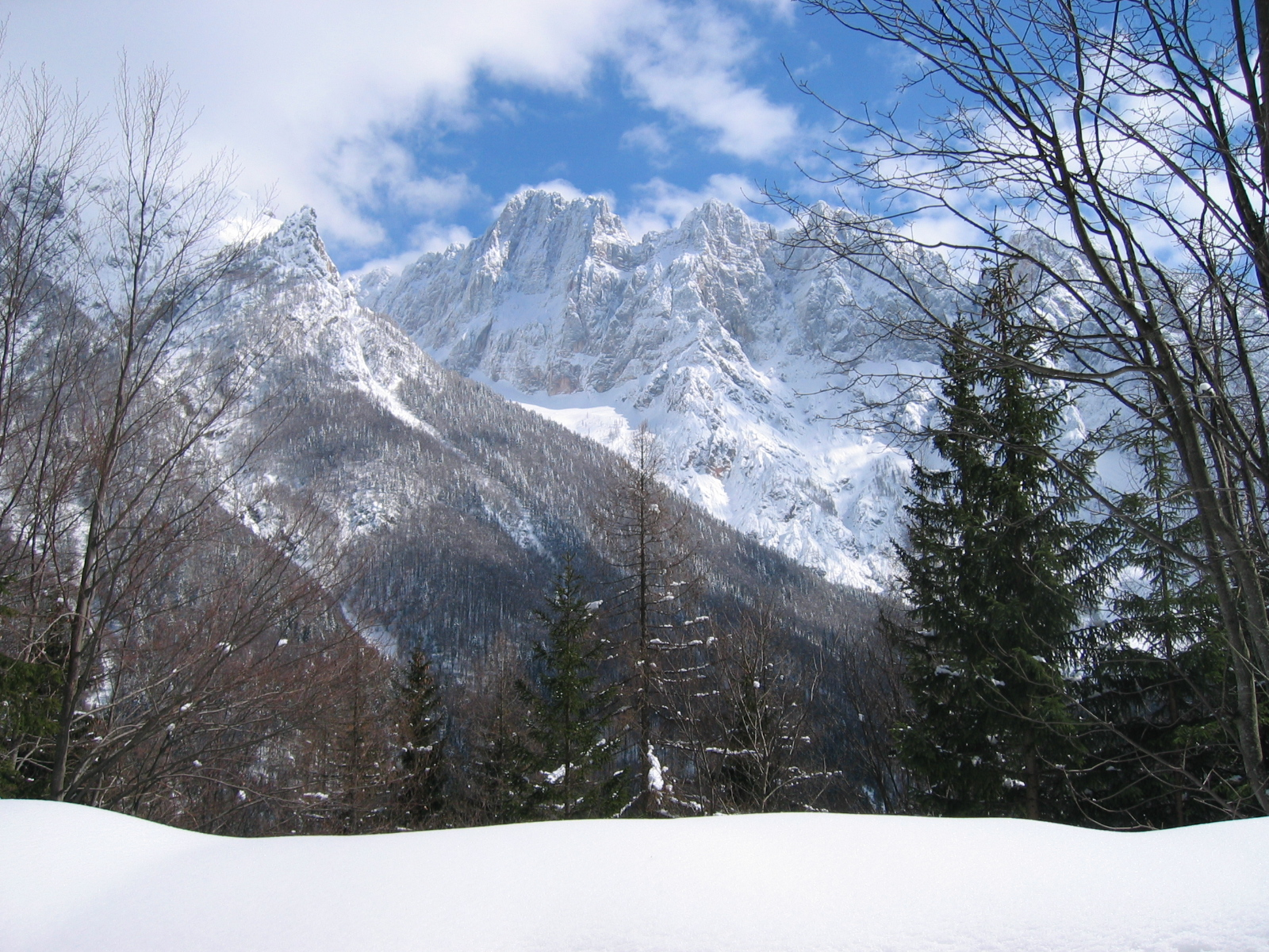 Škrlatica, druga najvišja slovenska gora (2740 m).